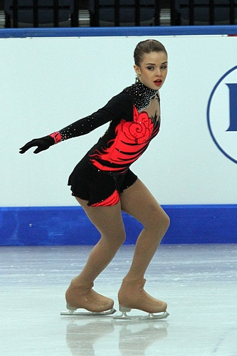 Изадора Вильямс (Бразилия) на чемпионате мира по фигурному катанию среди юниоров 2012